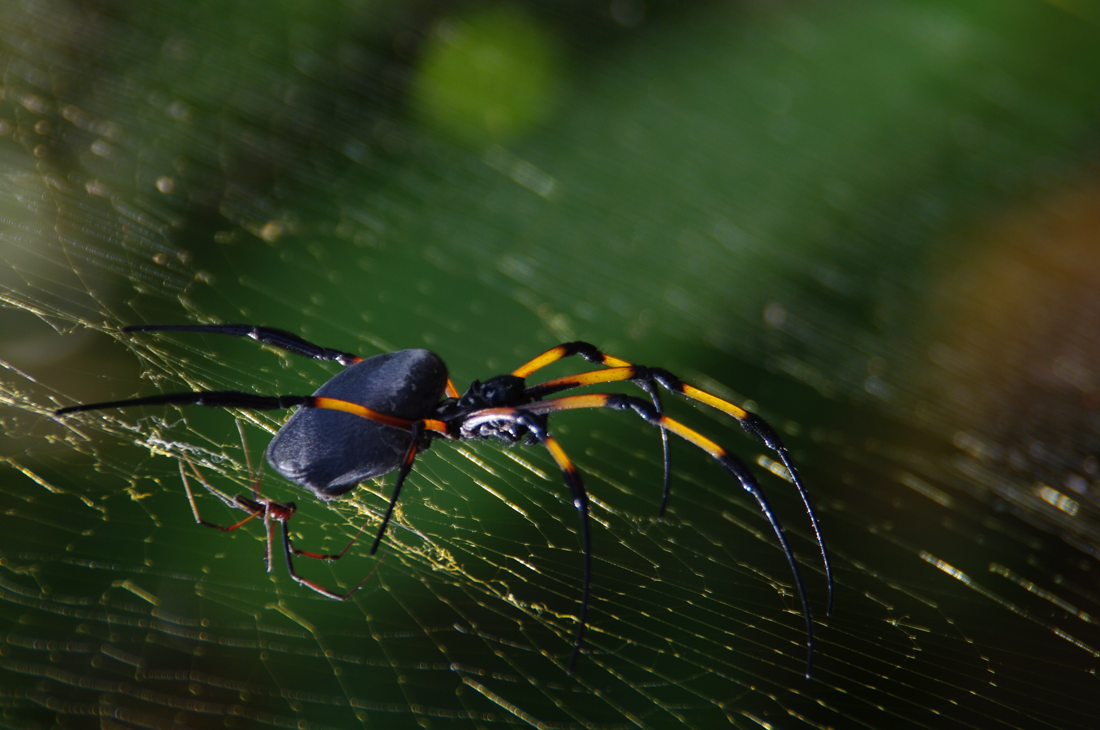 Araignée Nephila femelle et mâle (la petite) prise sur l'ile de la Réunion (Hellbourg)